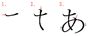 Orden de los trazos de あ. Imagen creada por mí. Categoría:Kana (imagen)